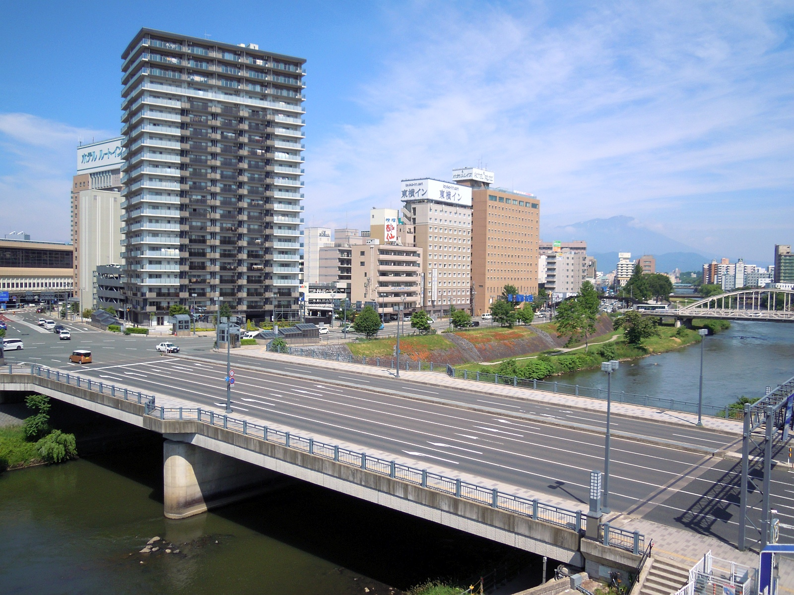 岩手県盛岡市の北上川に架かる不来方橋を左岸下流側から。左奥に見える横長の建物は盛岡駅。右奥（上流）に見える橋は開運橋、さらに右遠景に輪郭が見える山は岩手山。